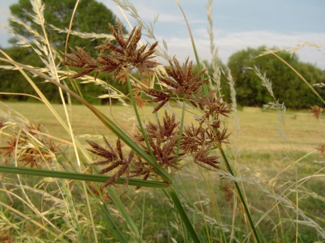 Juncia loca (Cyperus longus) en una pradera en el Valle de Amblés, Ávila España